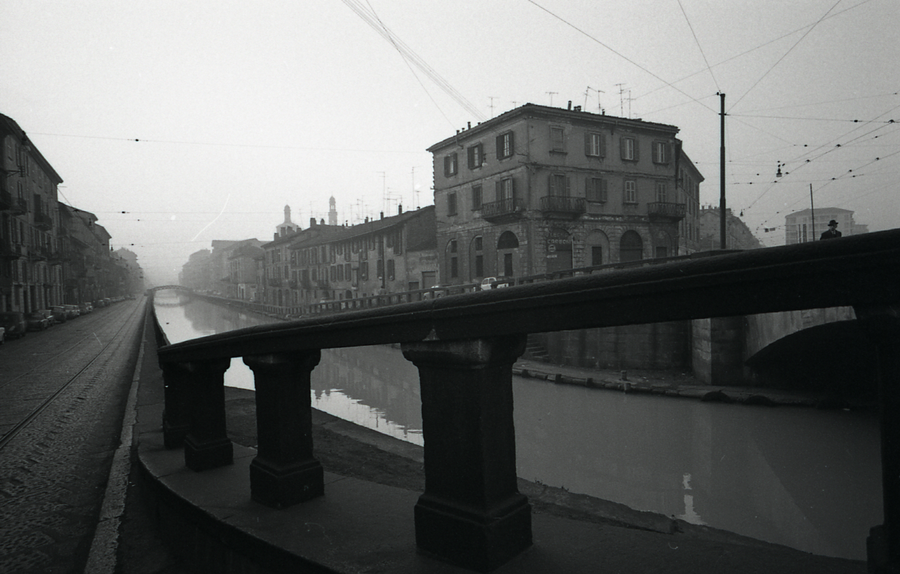 Serie fotografica : Milano, 1967 / Paolo Monti. - Strisce: 3, Fotogrammi complessivi: 17 : Negativo b/n, gelatina bromuro d'argento/ pellicola ; 35 mm. - ((I fotogrammi hanno una doppia numerazione. . - Sul portanegativi: Leica M 21 mm Adox 21